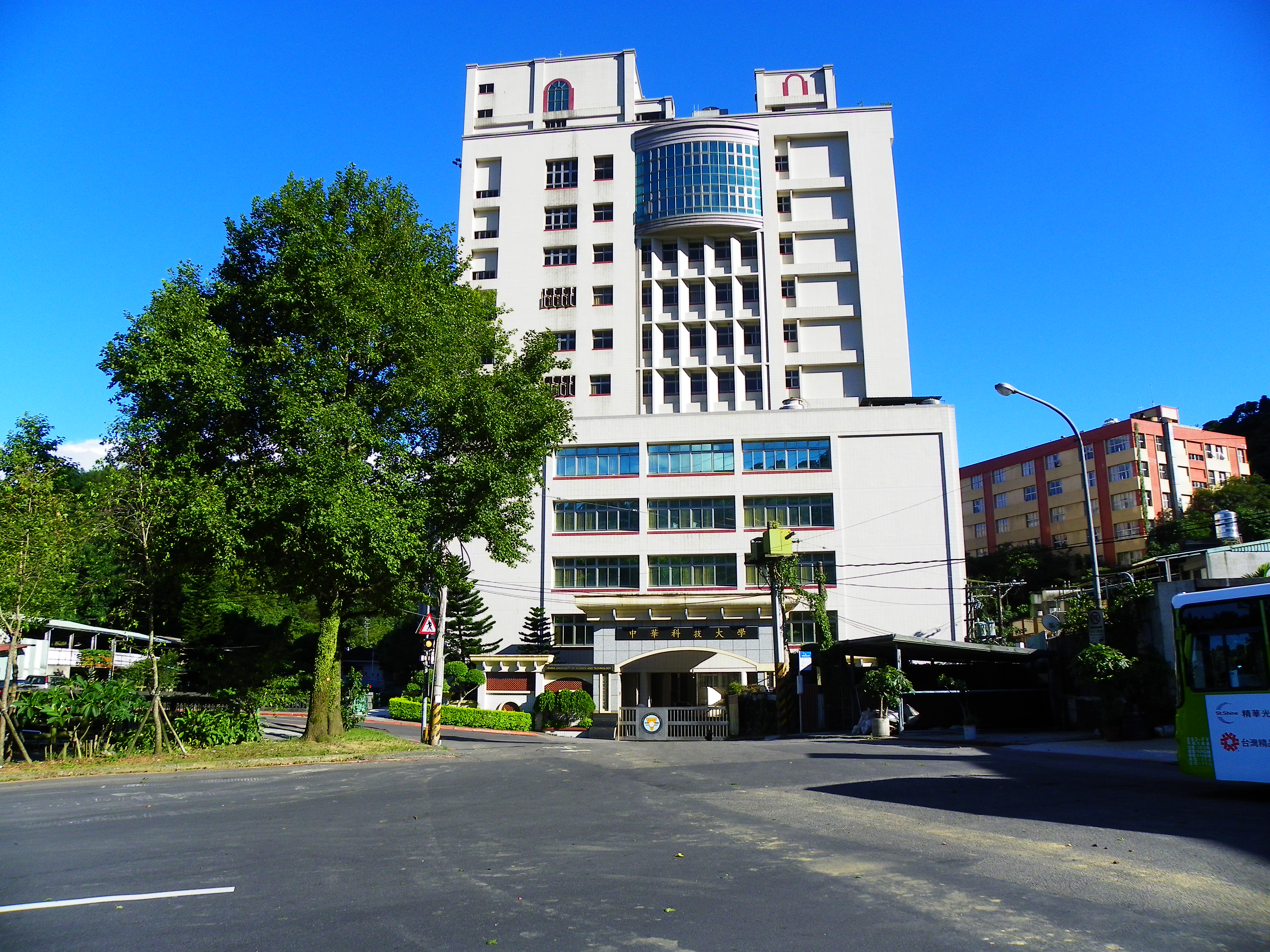 中華科技大學臺北校區西面的建華樓（前）與復華樓（後）。